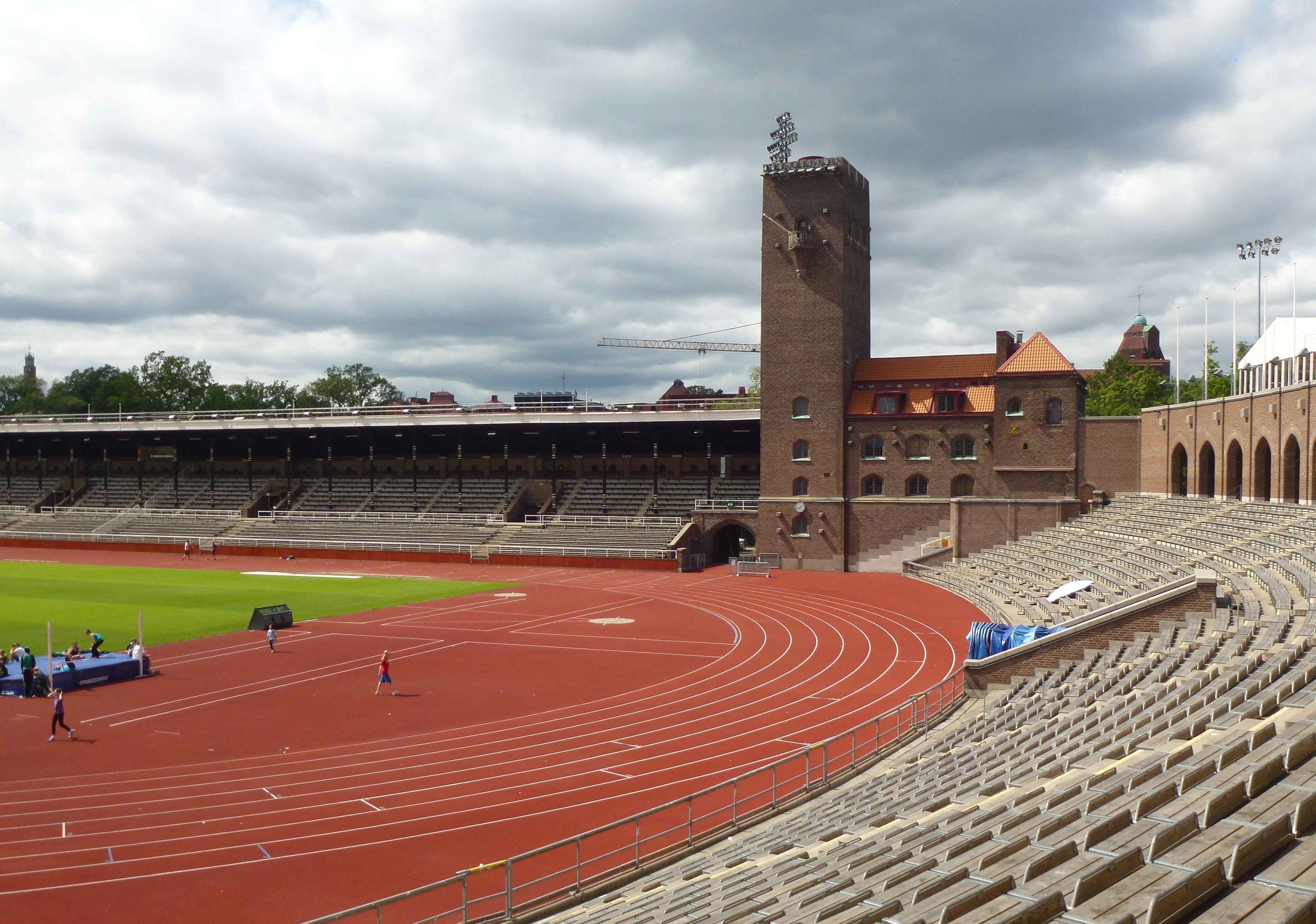 Stockholms stadion norra tornet